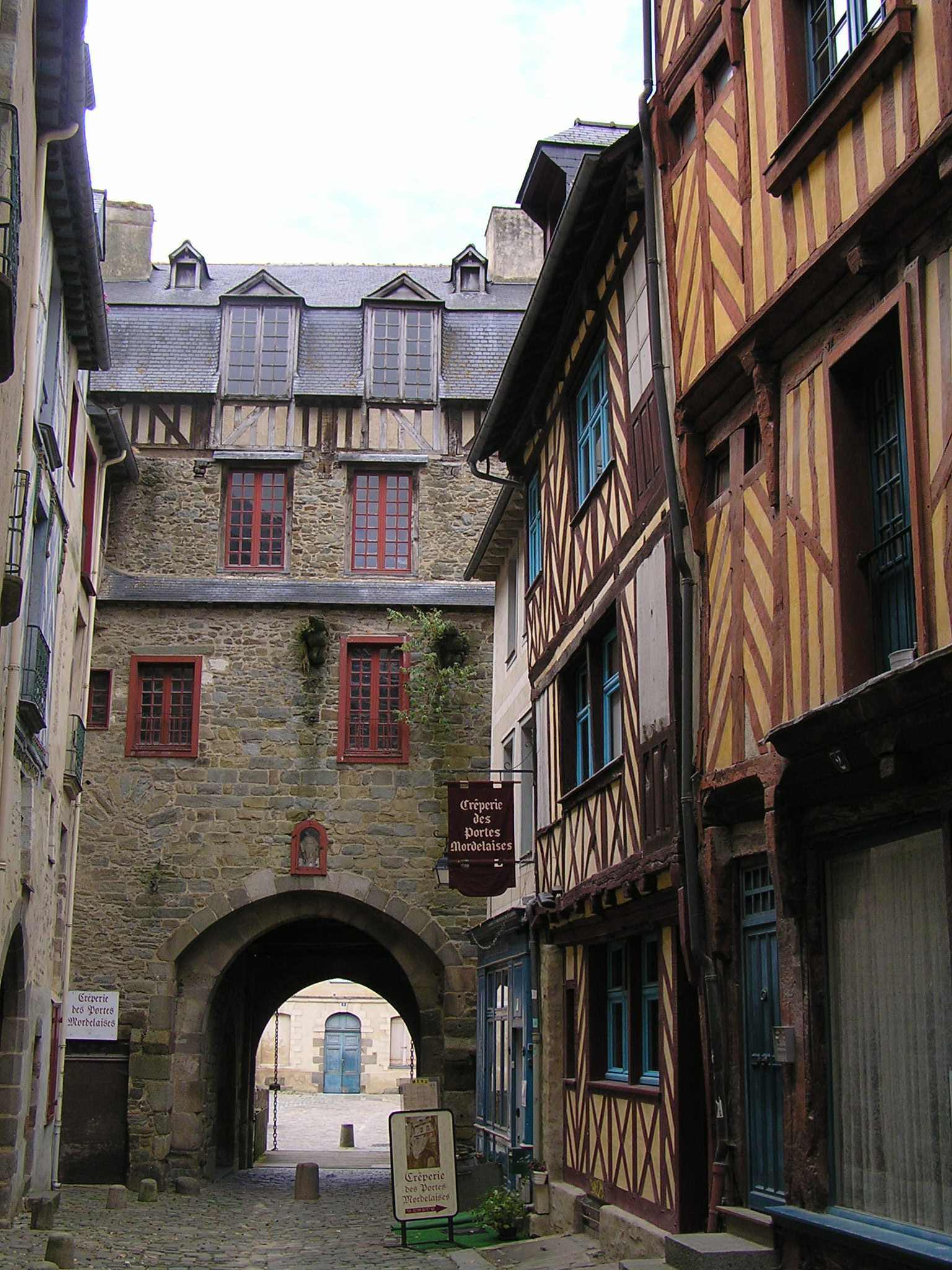 Maisons médiévales à Rennes, dans la rue des Portes Mordelaises.